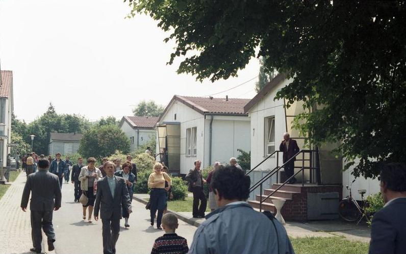 Juni 1988 Friedland Durchgangslager für Aussiedler und Flüchtlinge